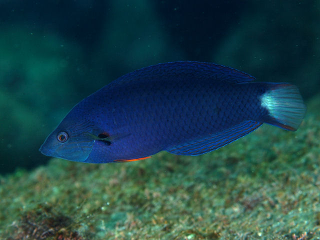 ムナテンベラ Halichoeres melanochir